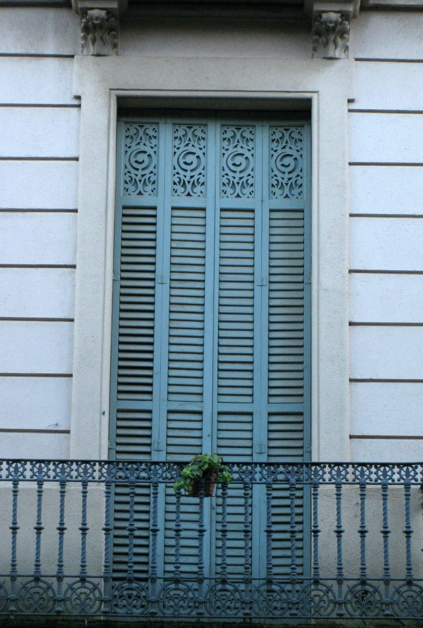 Casa Sanmartí, al passeig del Comte d'Ègara núm. 14-16 (Terrassa). Edifici de Lluís Muncunill, del 1900. Detall d'una de les finestres.